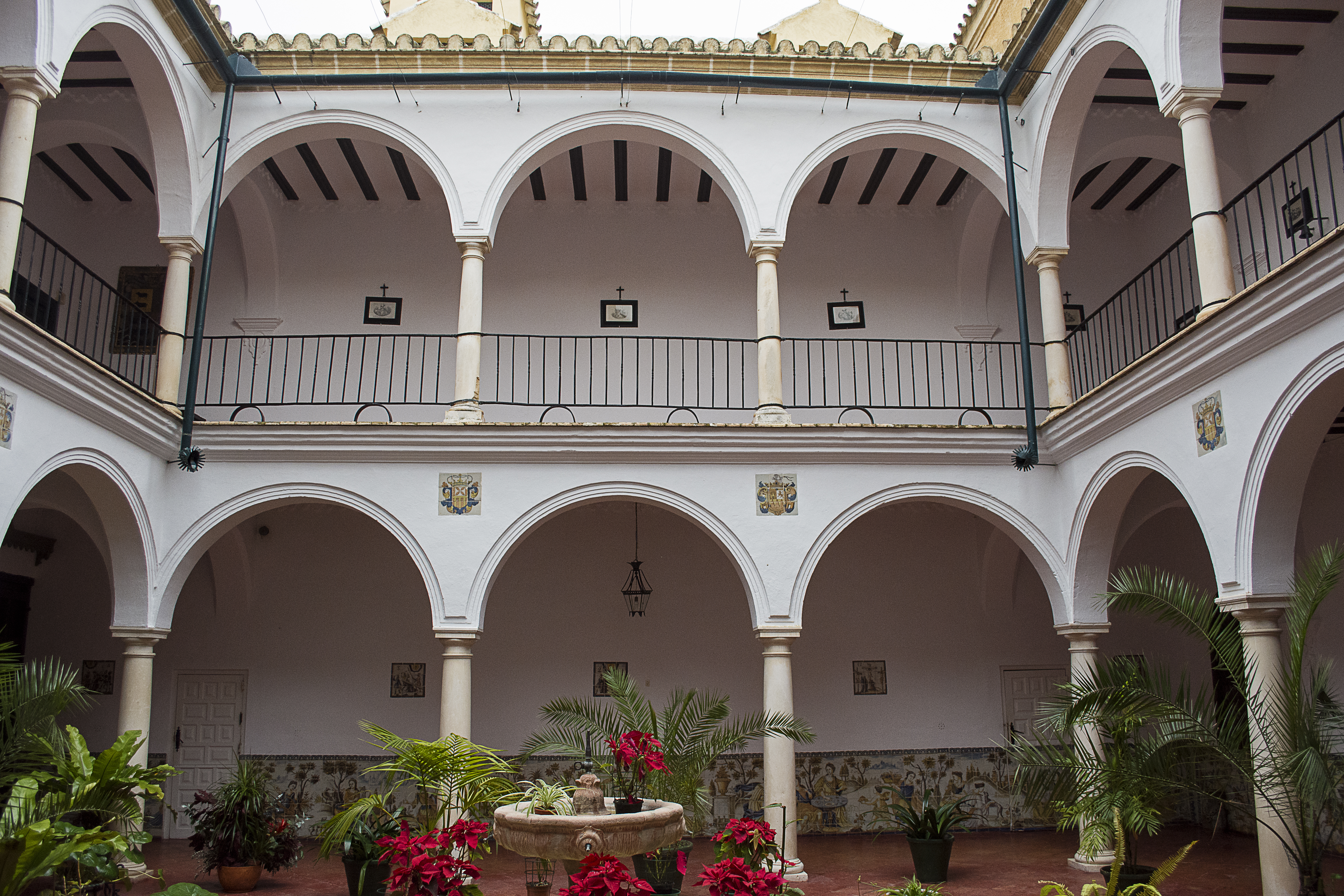 Claustro principal del convento de la Encarnación de Osuna (provincia de Sevilla).